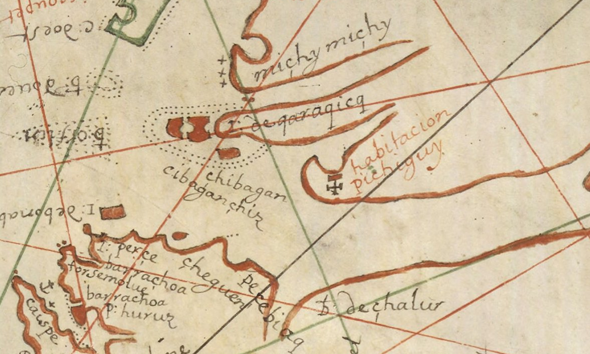 Détail de la carte de Pierre Detcheverry de 1689, montrant l'actuelle Péninsule acadienne au Nouveau-Brunswick (Canada).